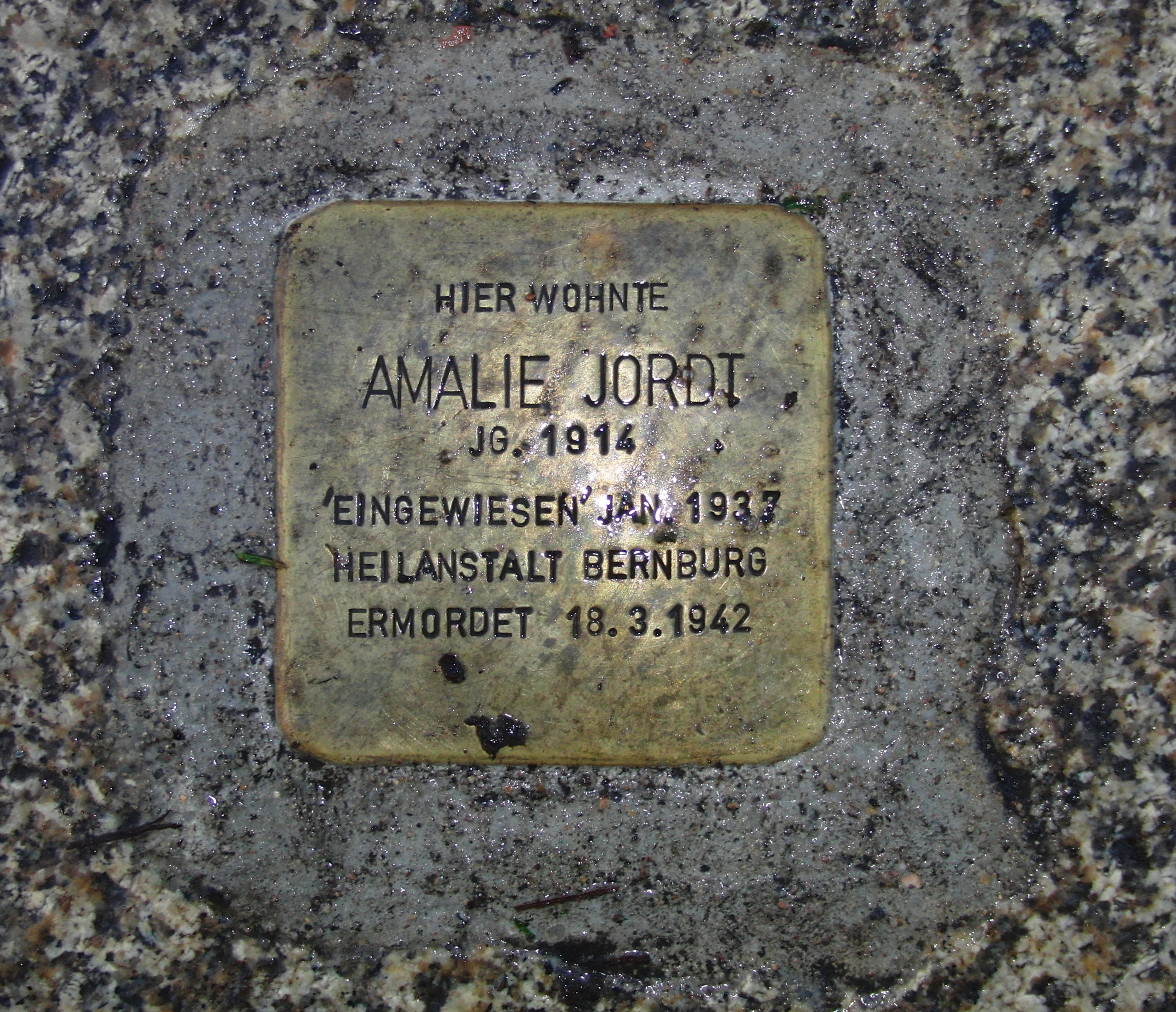 Hier wohnte Amalie Jordt Jg. 1914 'eingewiesen' Jan. 1937 Heilanstalt Bernburg ermordet 18.3.1942 [Adresse: Blücherstraße 17]